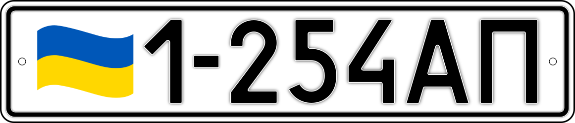 Знак 3.2